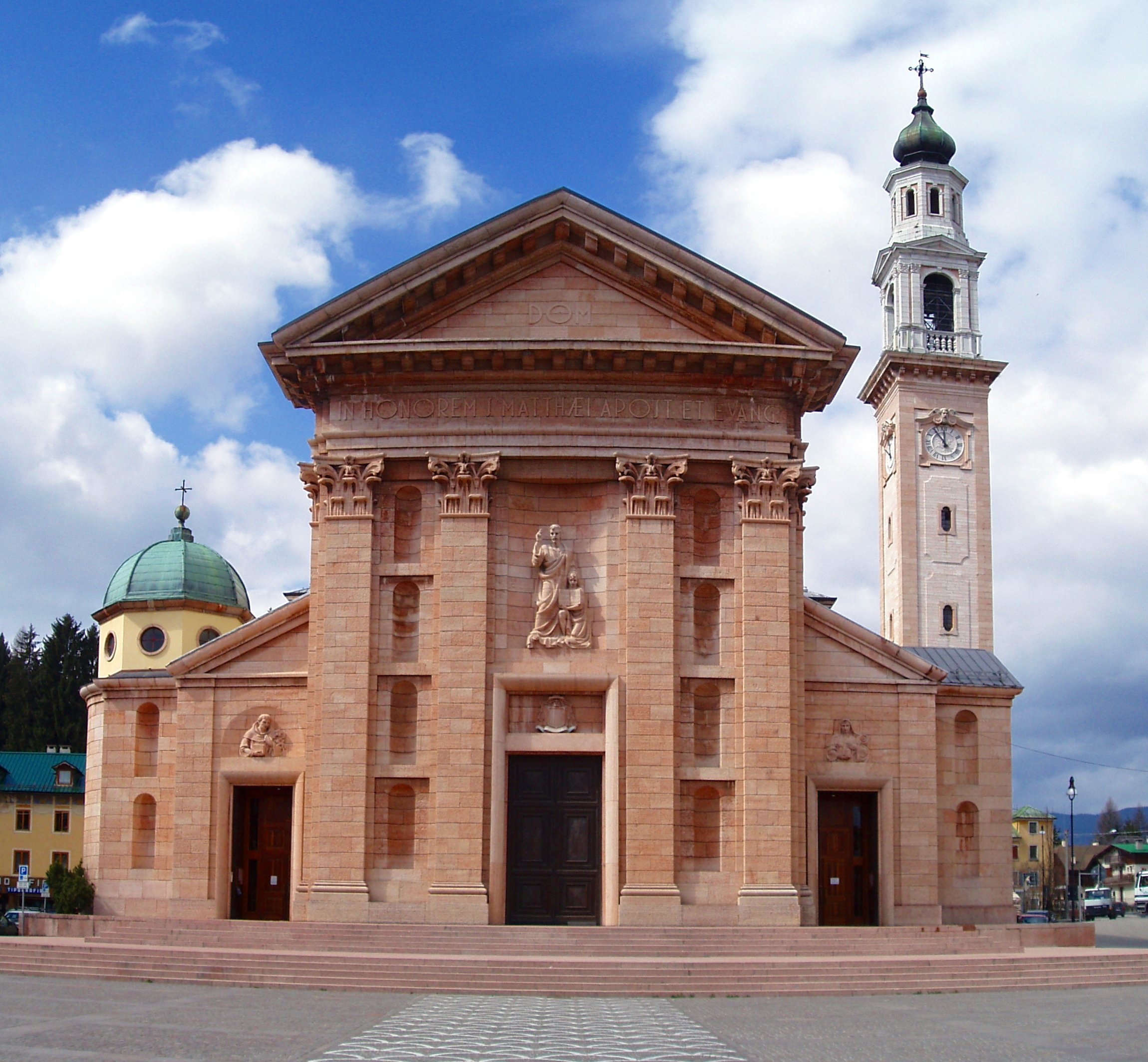 Duomo di San Matteo, Asiago, Italy